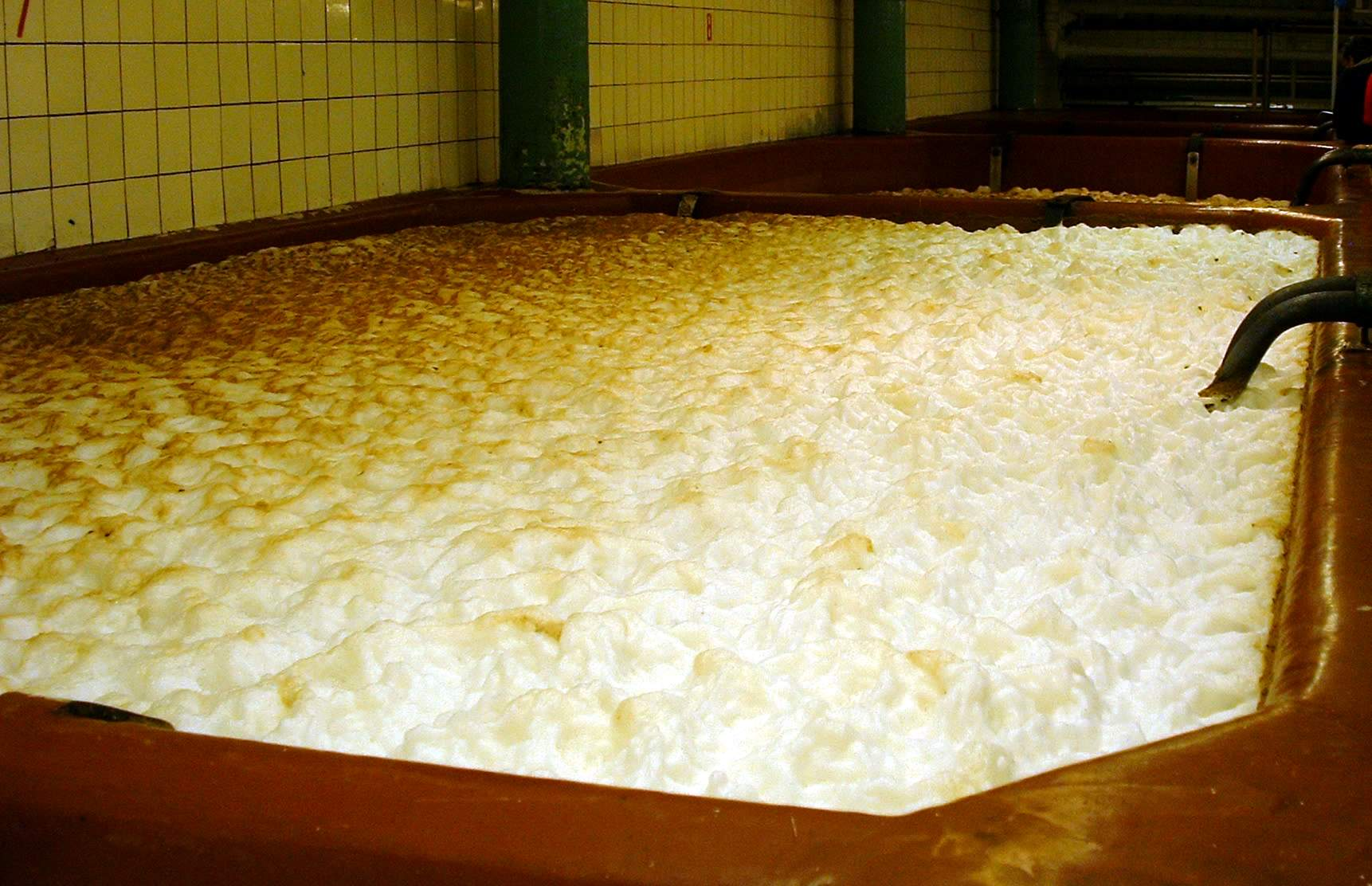 Nymburk, Zrající postřižinské pivo, Nymburský pivovar